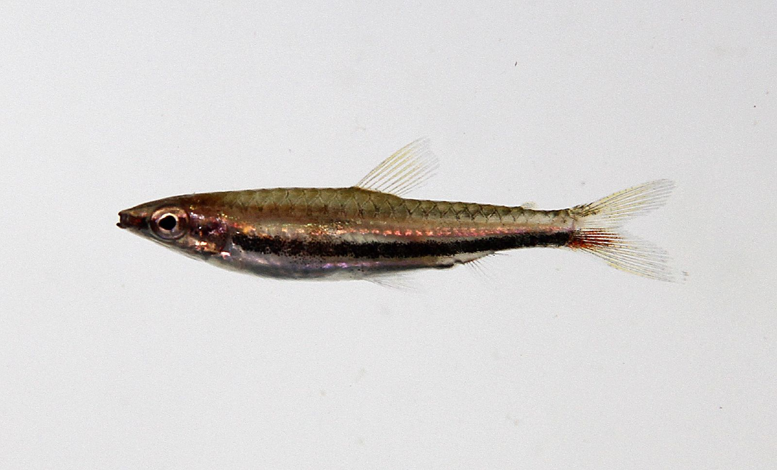 Lebiasinidae Nannostomus marilynae